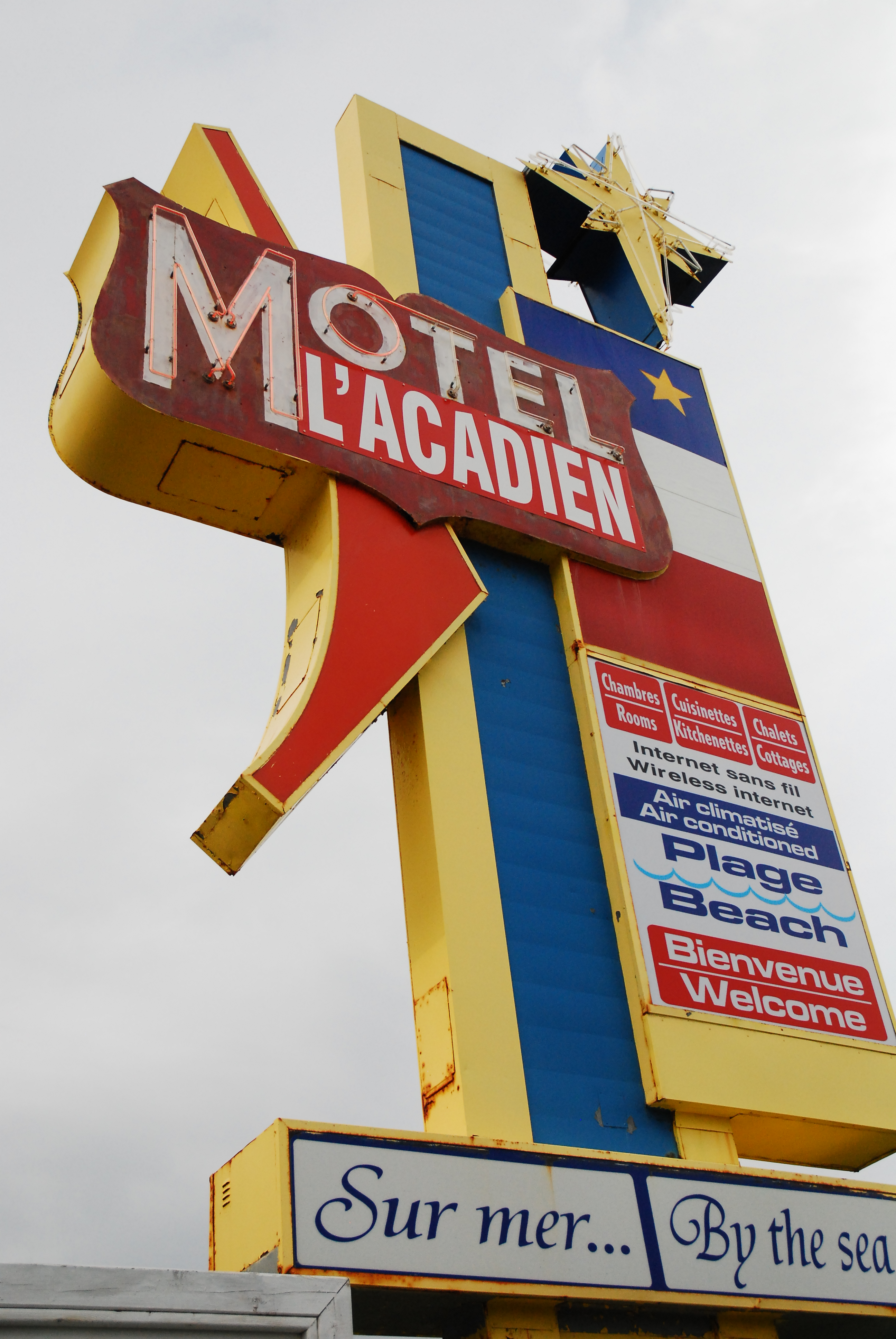 Motel L'Acadien - Petit-Rocher